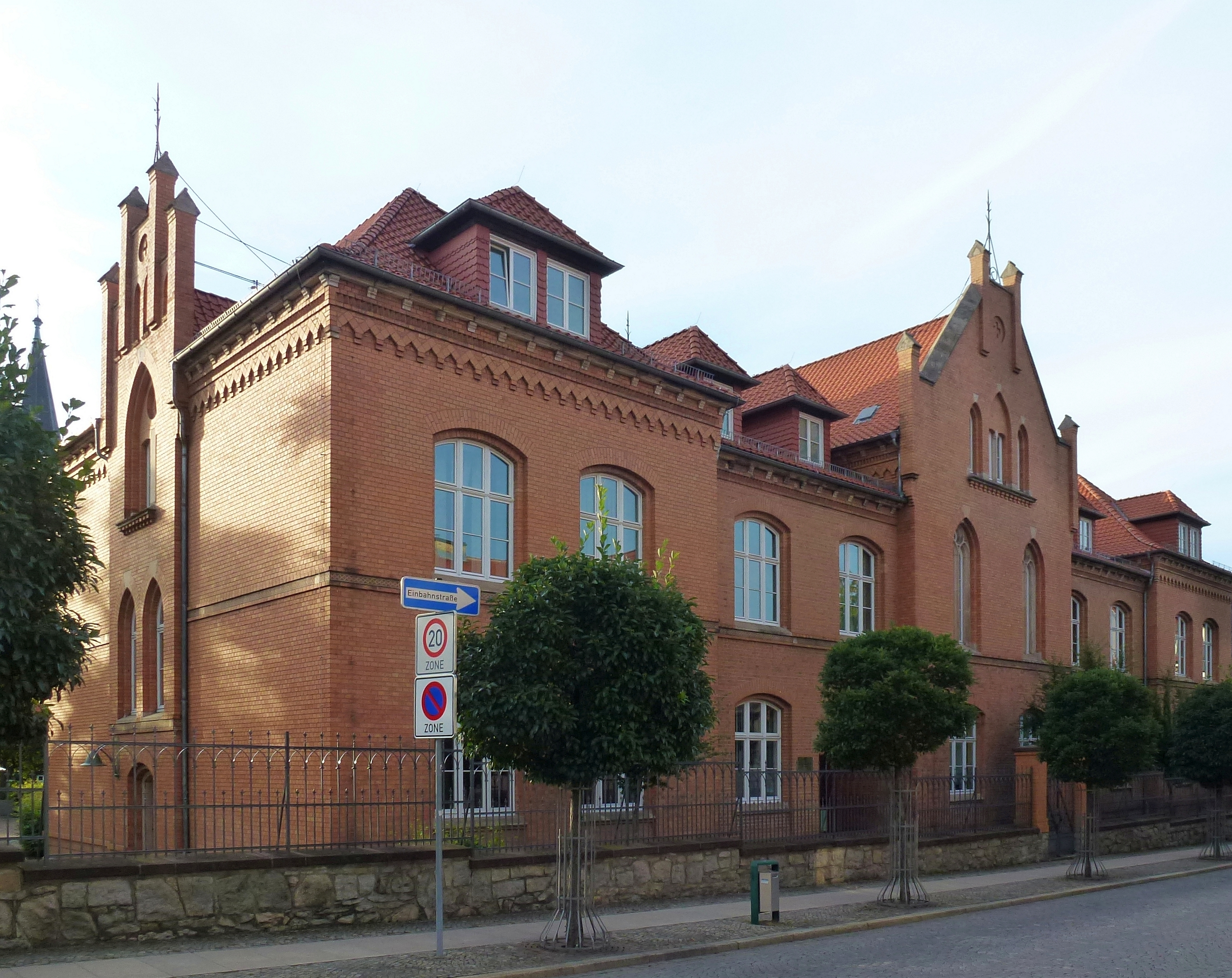 Landesgymnasium für Musik im seit 1895 bestehenden "Fürstin-Anna-Lyzeum" in der Kanzleistraße 4 in Wernigerode